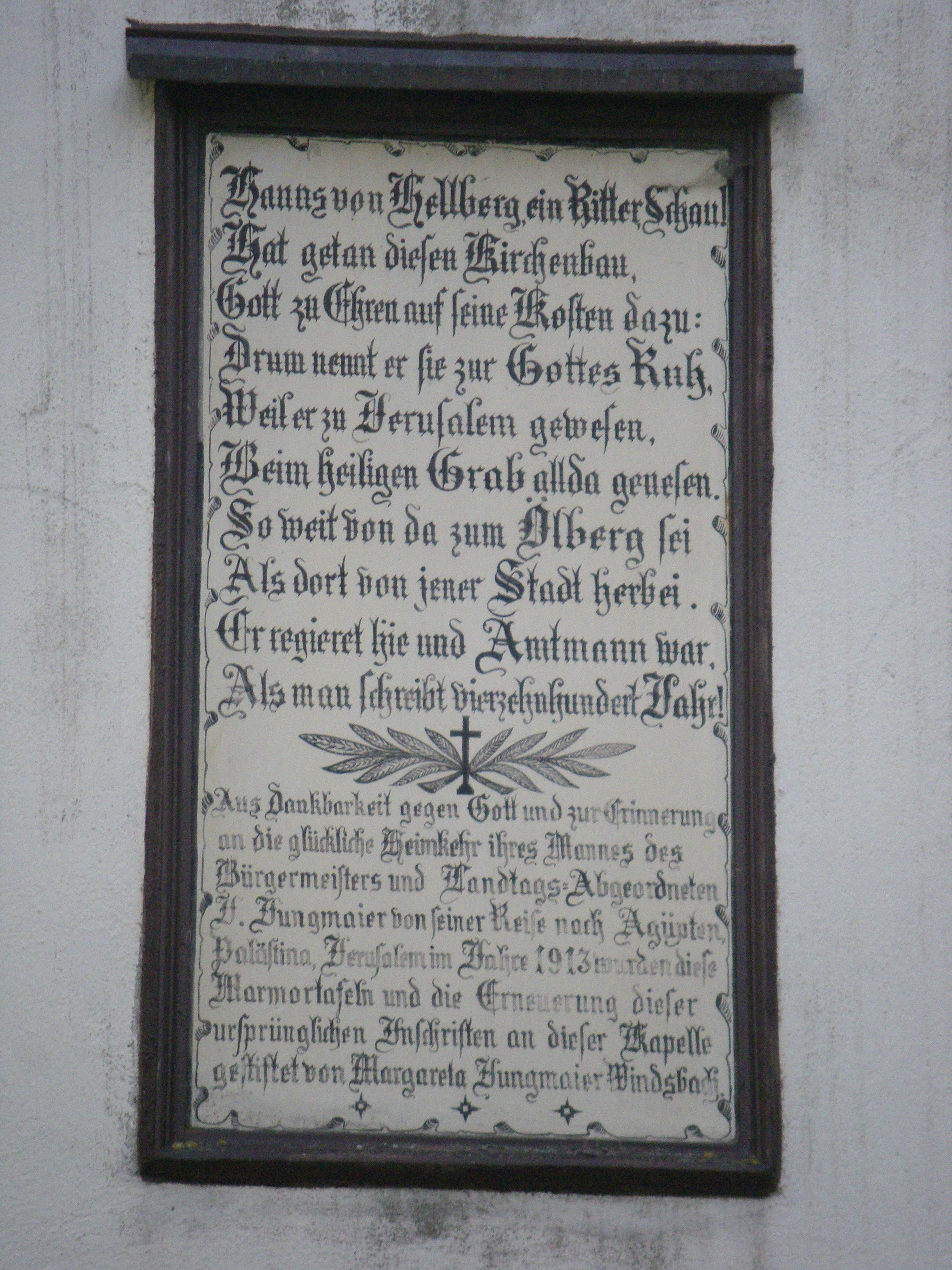 Tafel in der Ostfassade der Gottesruhkapelle Windsbach